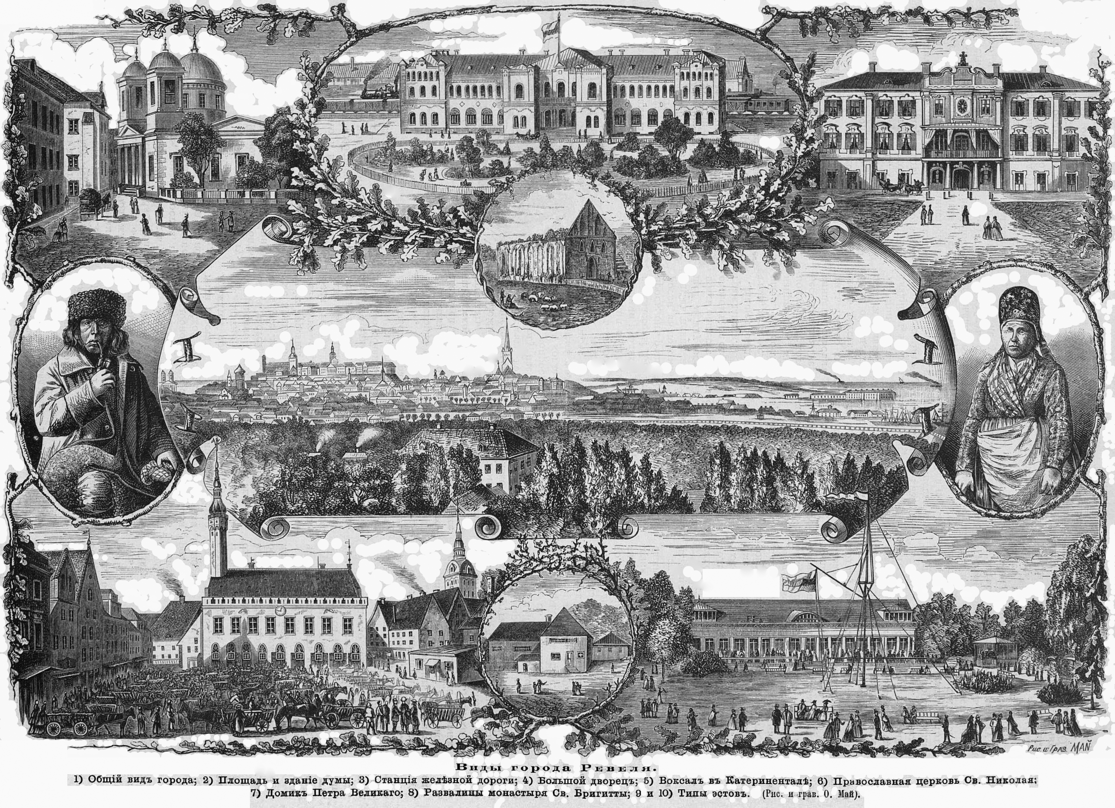 Виды Ревеля, 1876 год